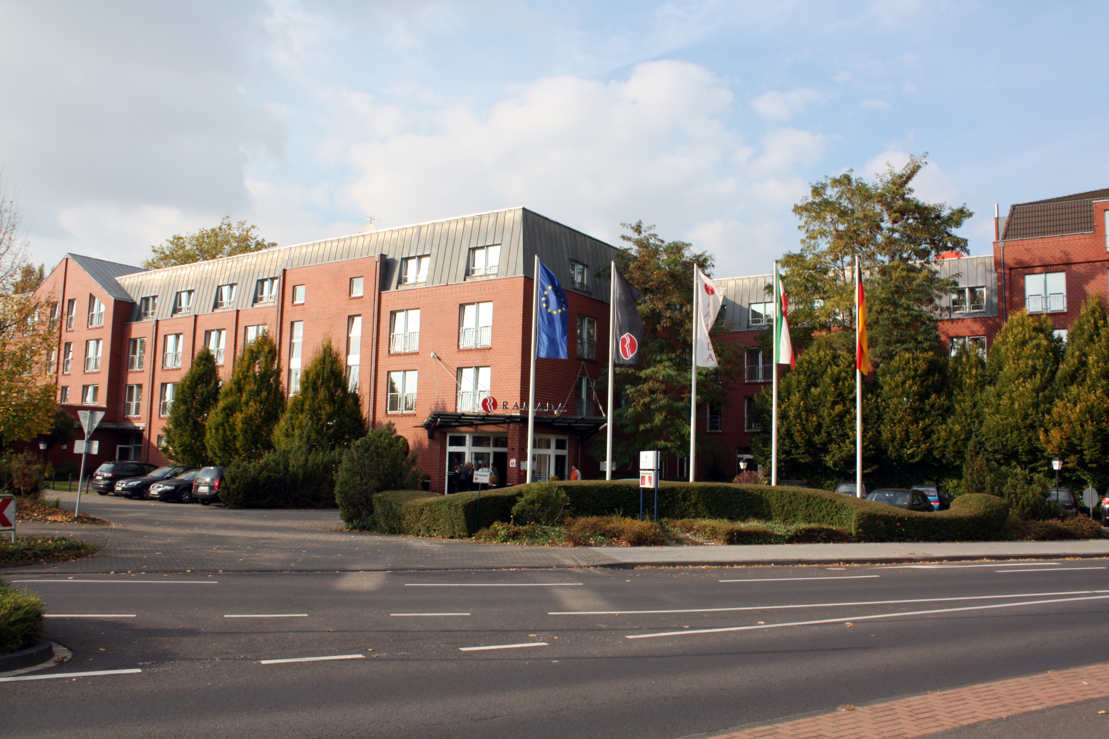 Hürth, RAMADA Hotelanlage auf der Theresienhöhe